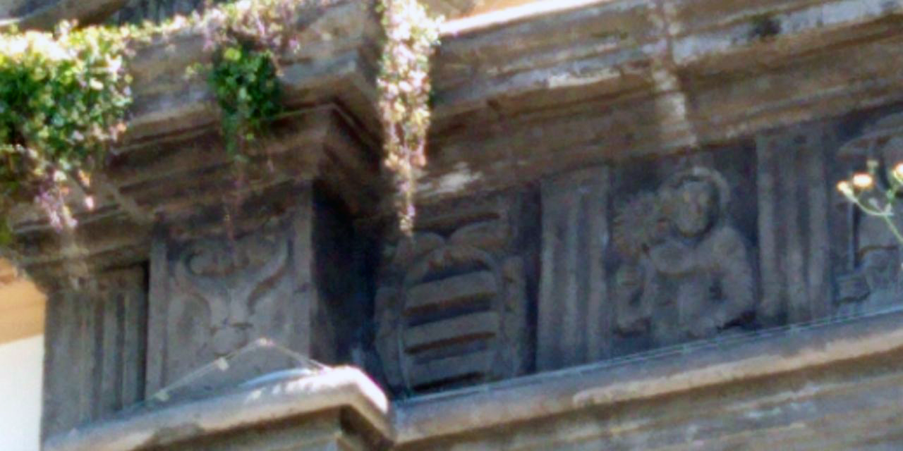 Stemma della famiglia Carafa della Stadera sul portale del convento di Santa Maria degli angeli (XVI-XVII sec.)